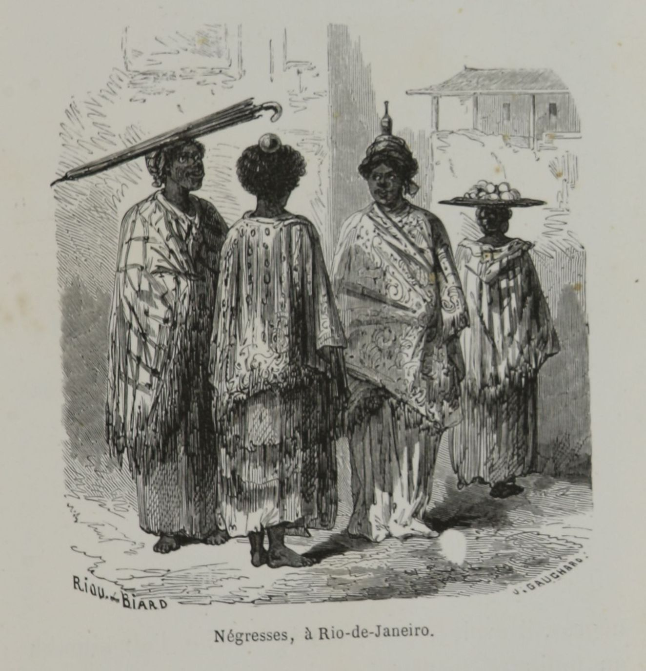 "Negras, no Rio de Janeiro". Ilustração. Descrição Física: 1 grav. pb.; gravura em madeira, dimensões da grav.: 11,0 x 9,5 cm em f. 24,0 x 15,0 cm; dimensões da imagem: 1324 x 1374 pixels; 300 dpi(resolução)